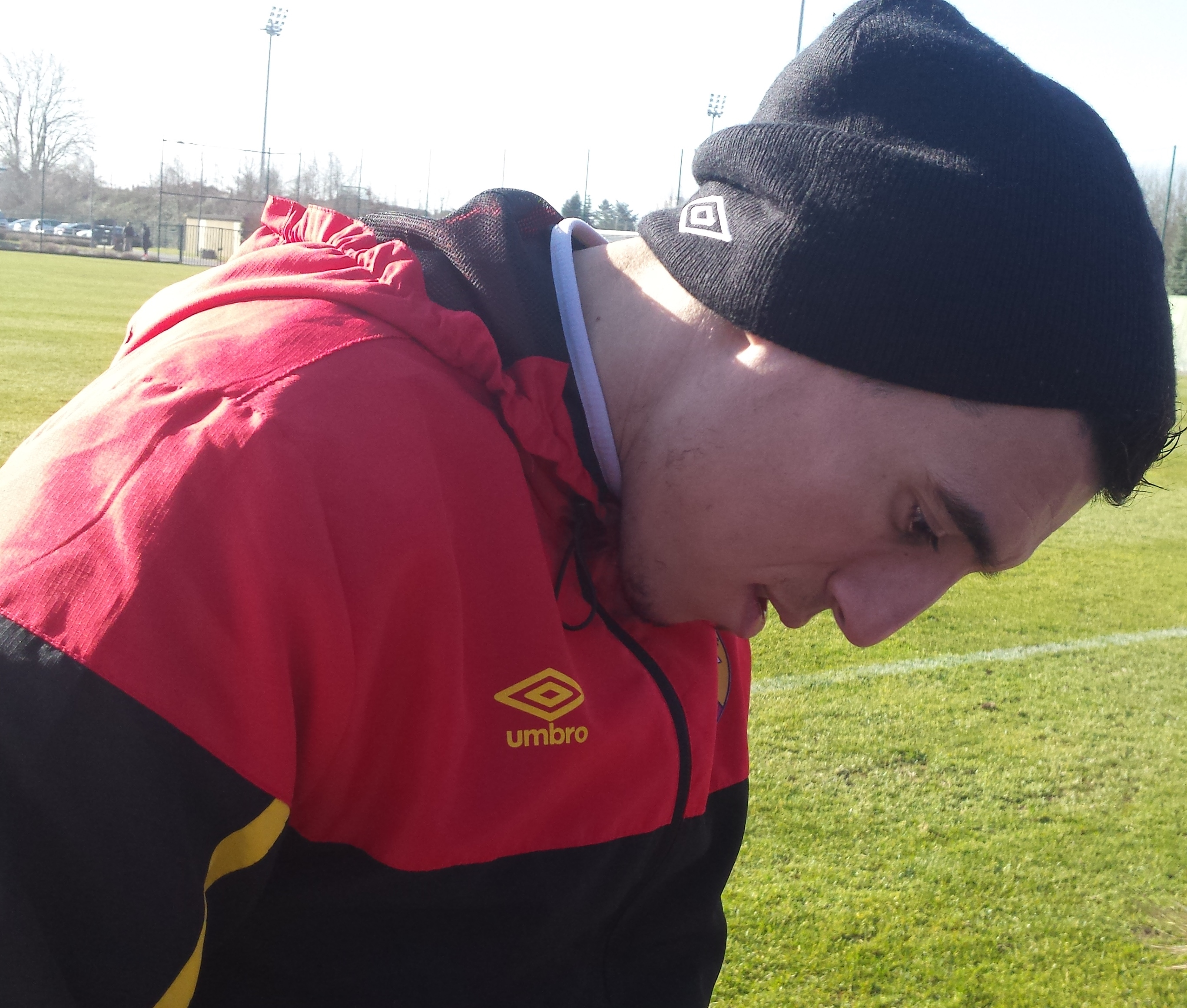 Alharbi El Jadeyaoui lors d'un entraînement public du Racing Club de Lens, le 5 mars 2015, sur le terrain San Siro du Centre technique et sportif de La Gaillette.